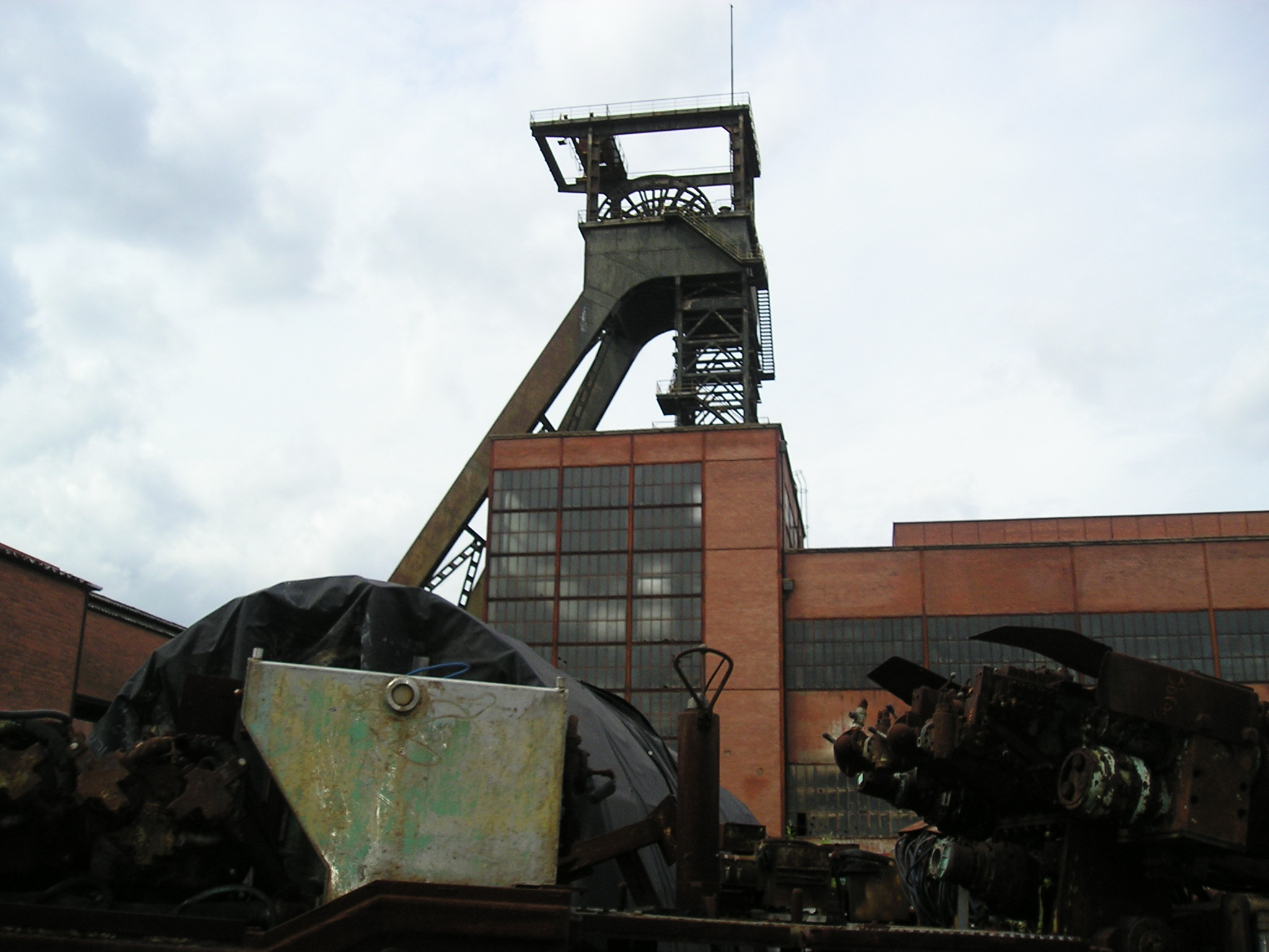 Chevalement à Petite Rosselle